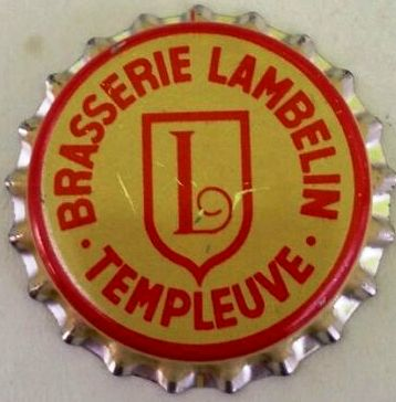 Capsule de bière française Lambelin (Nord)